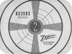 Zenith Test Pattern